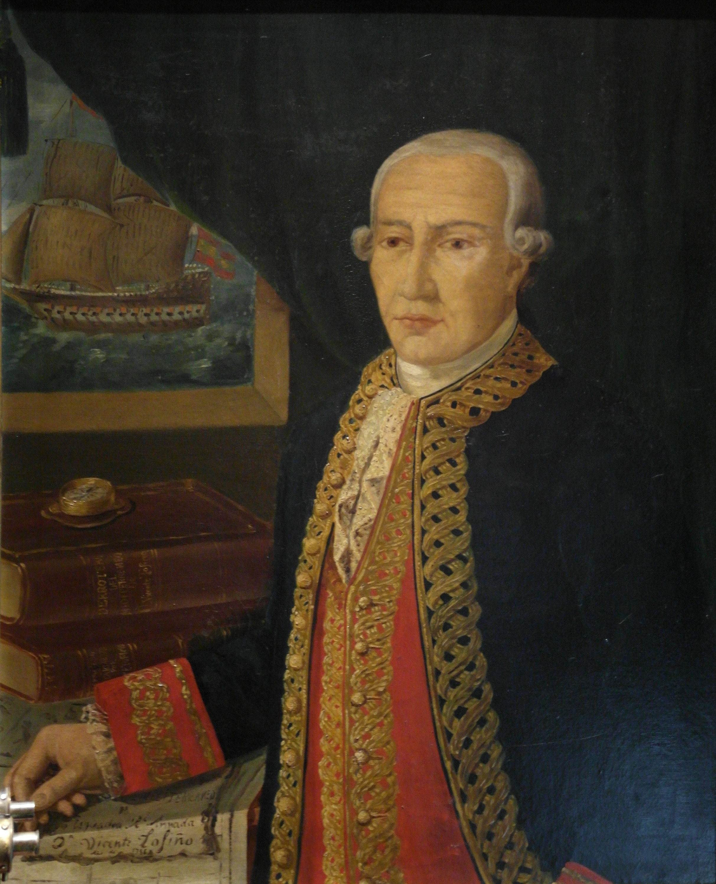 Vicente de Tofiño de San Miguel, jefe de escuadra de la real Armada. Anónimo.